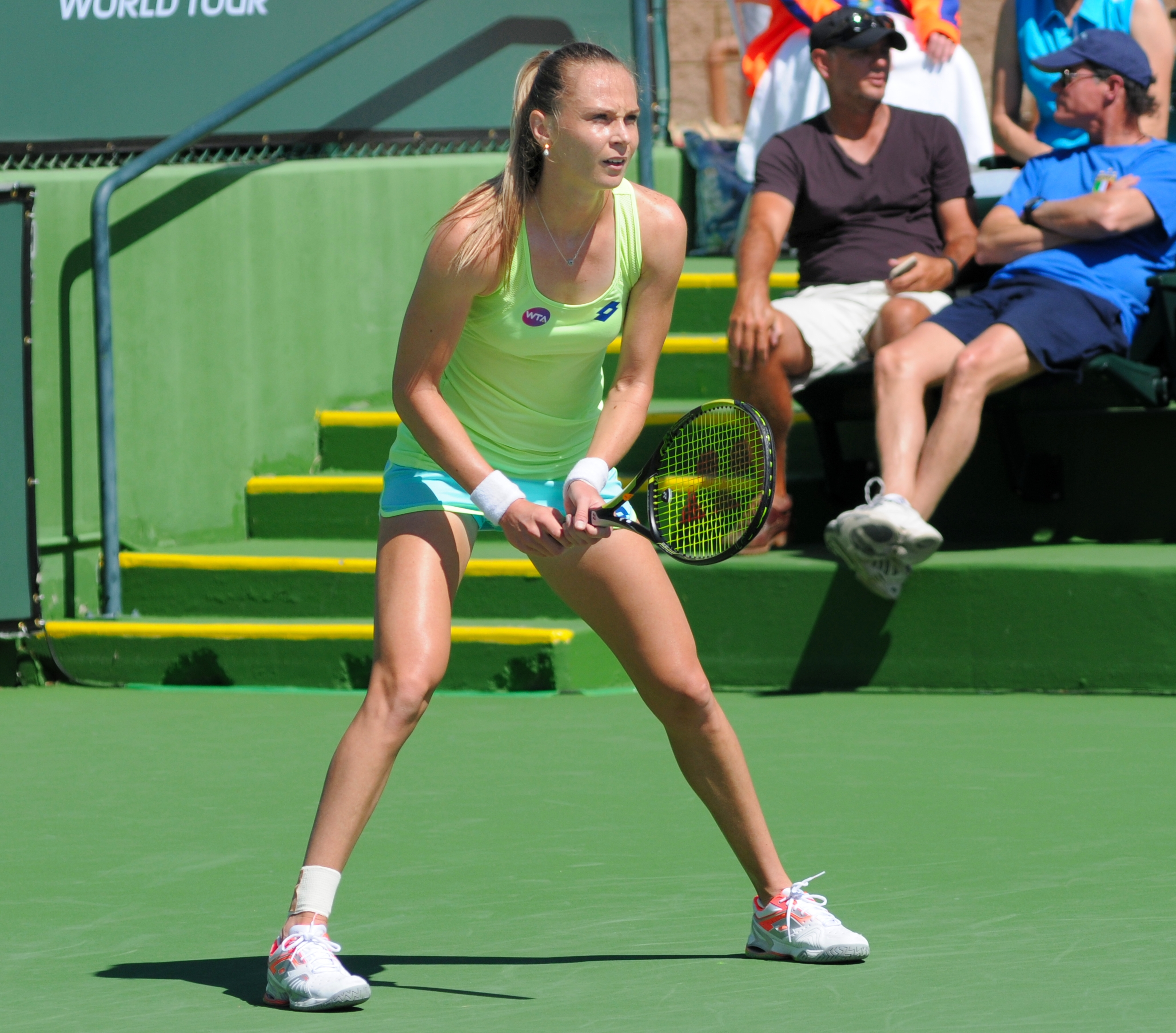 Magdalena Rybarikova